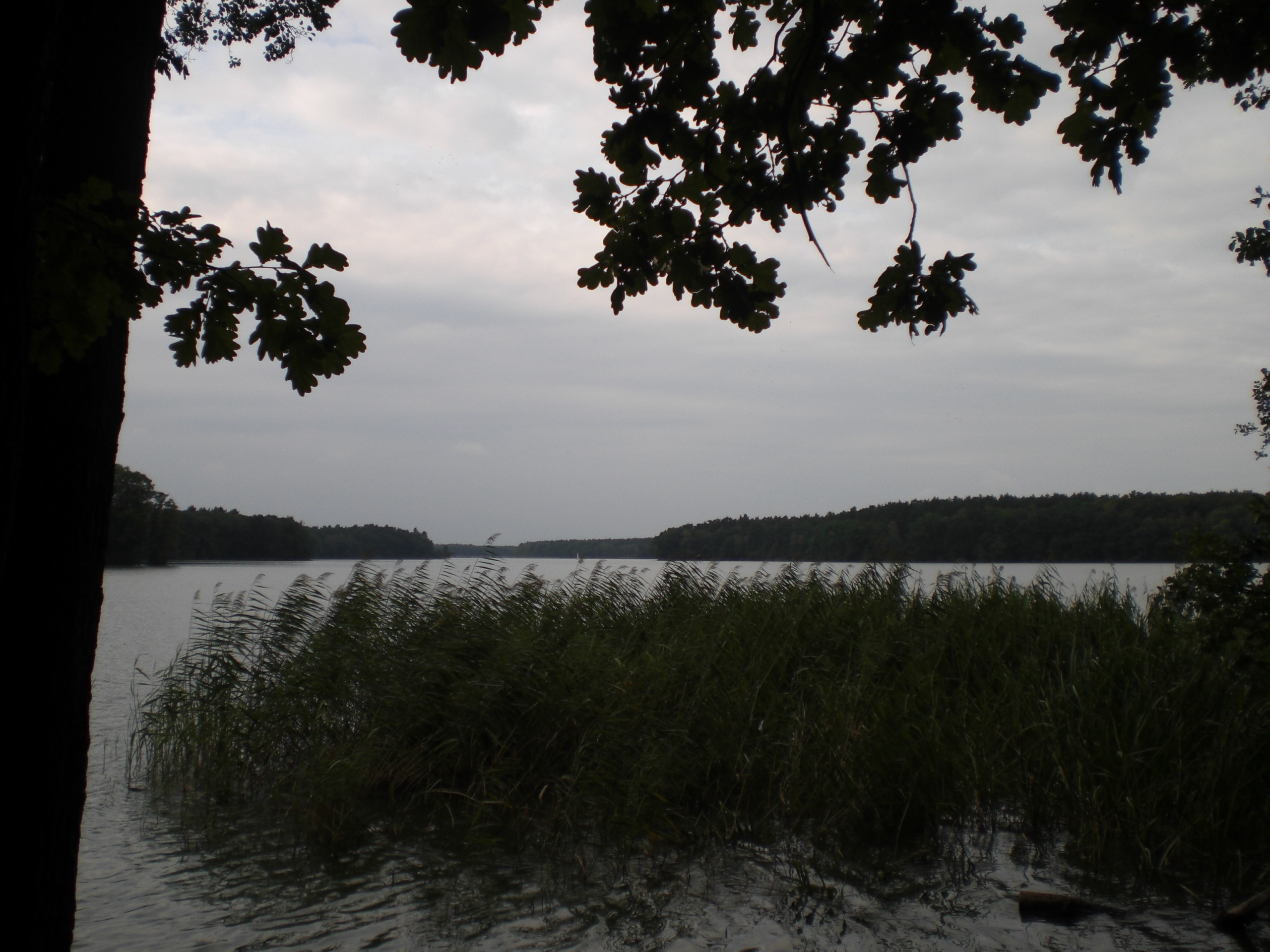 Untersee der Kyritzer Seenkette bei Wusterhausen, Blick nach Norden